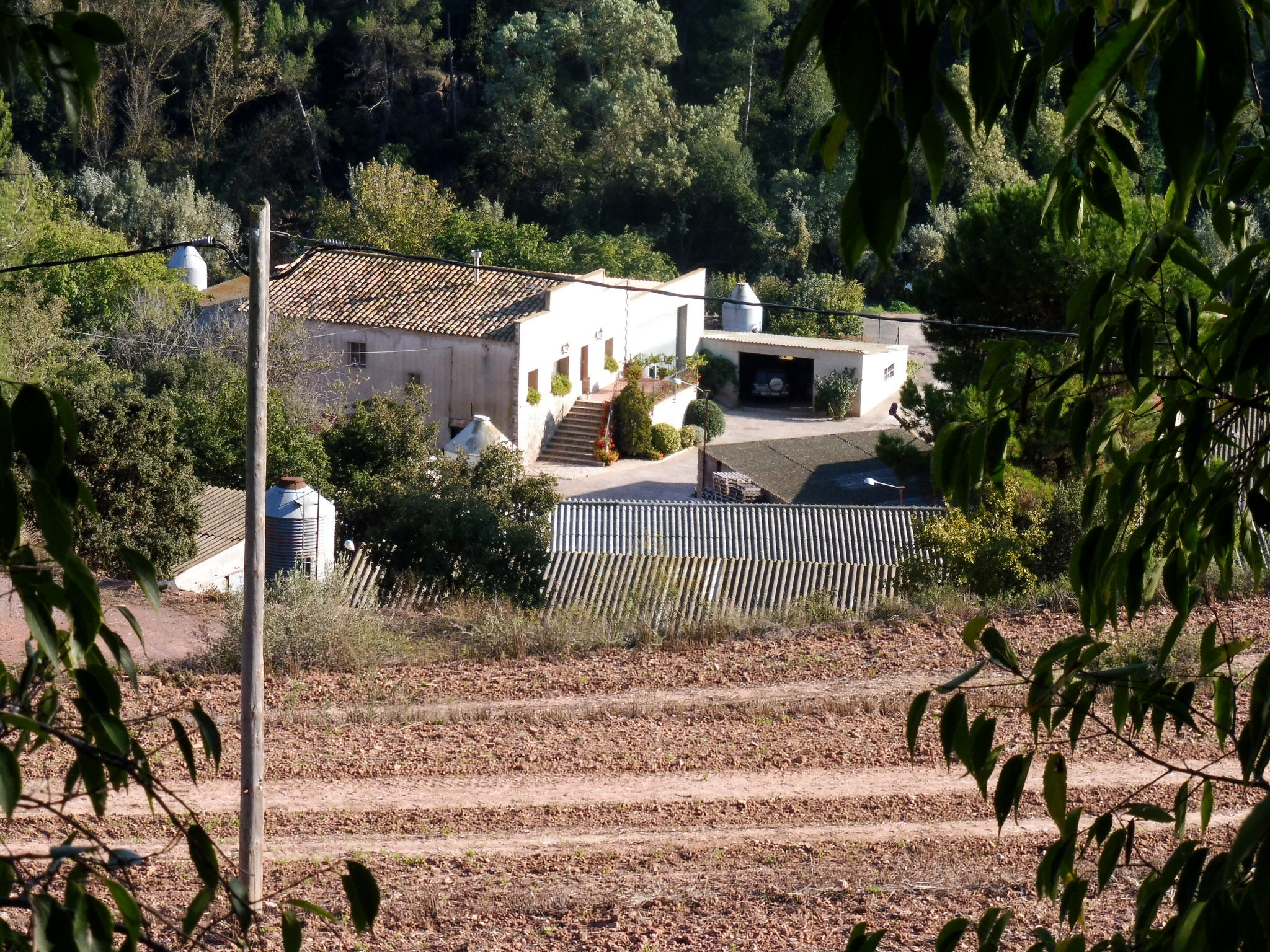 Can Pallerols (Veciana)